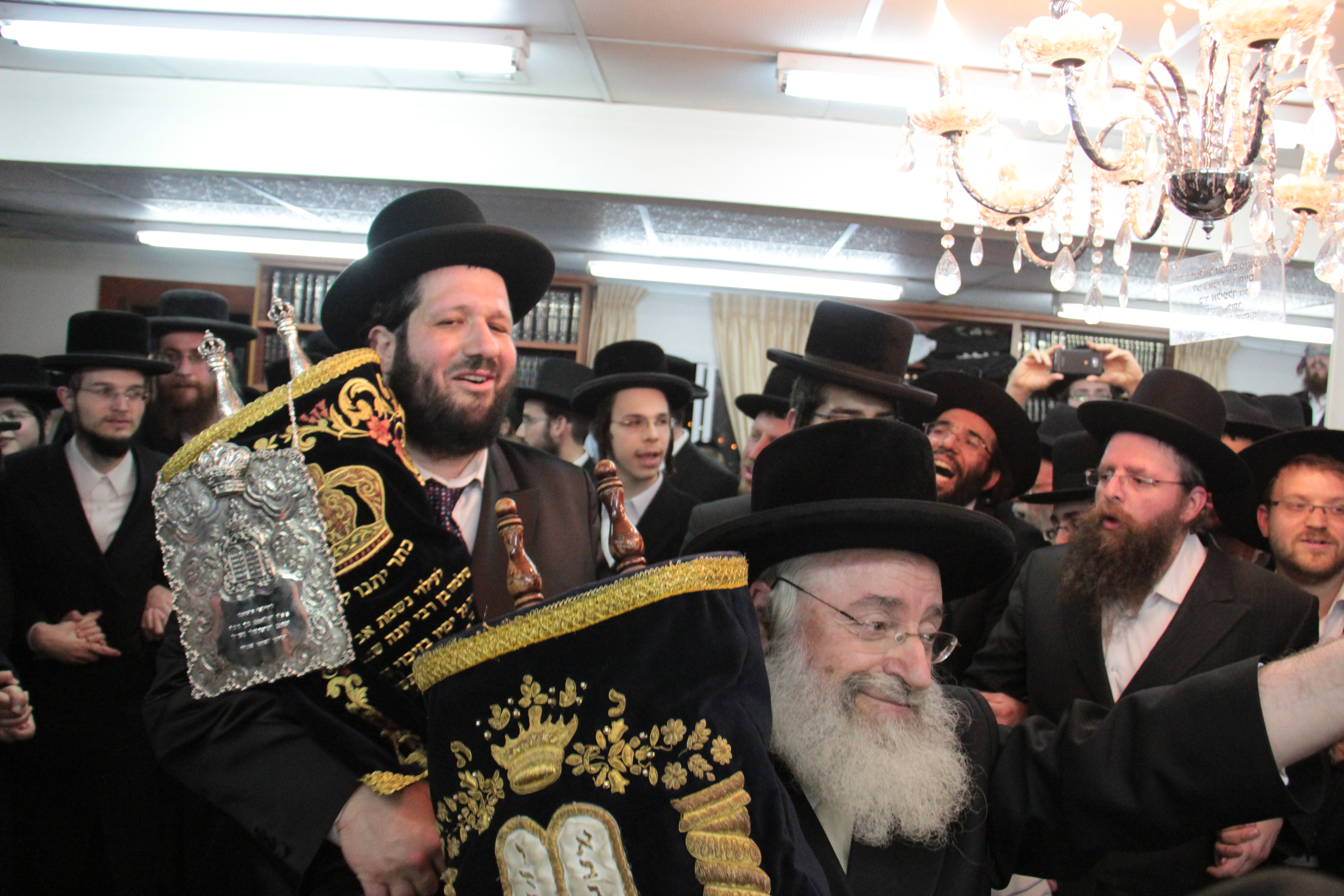 Sefer Torah in memory of Rabbi Shlomo Shtenzel in Beitar Illit Featuring Rabbi Asher Weiss Rabbi yonatan Shtencel